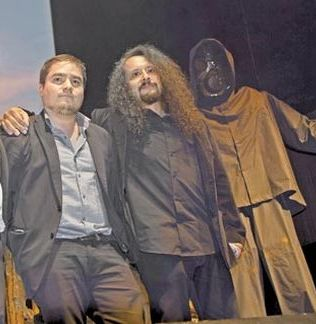 Dos de los fundadores del festival; Javier Castañeda y Juan Carlos Guerrero